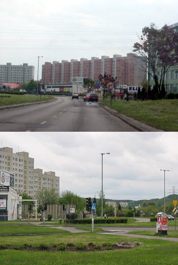 Zaspa, Gdańsk, Poland